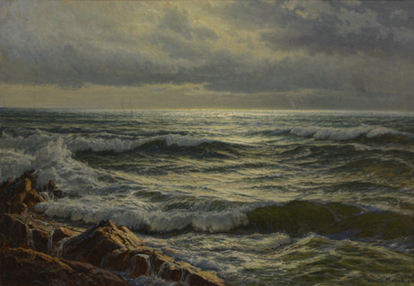 Ocean